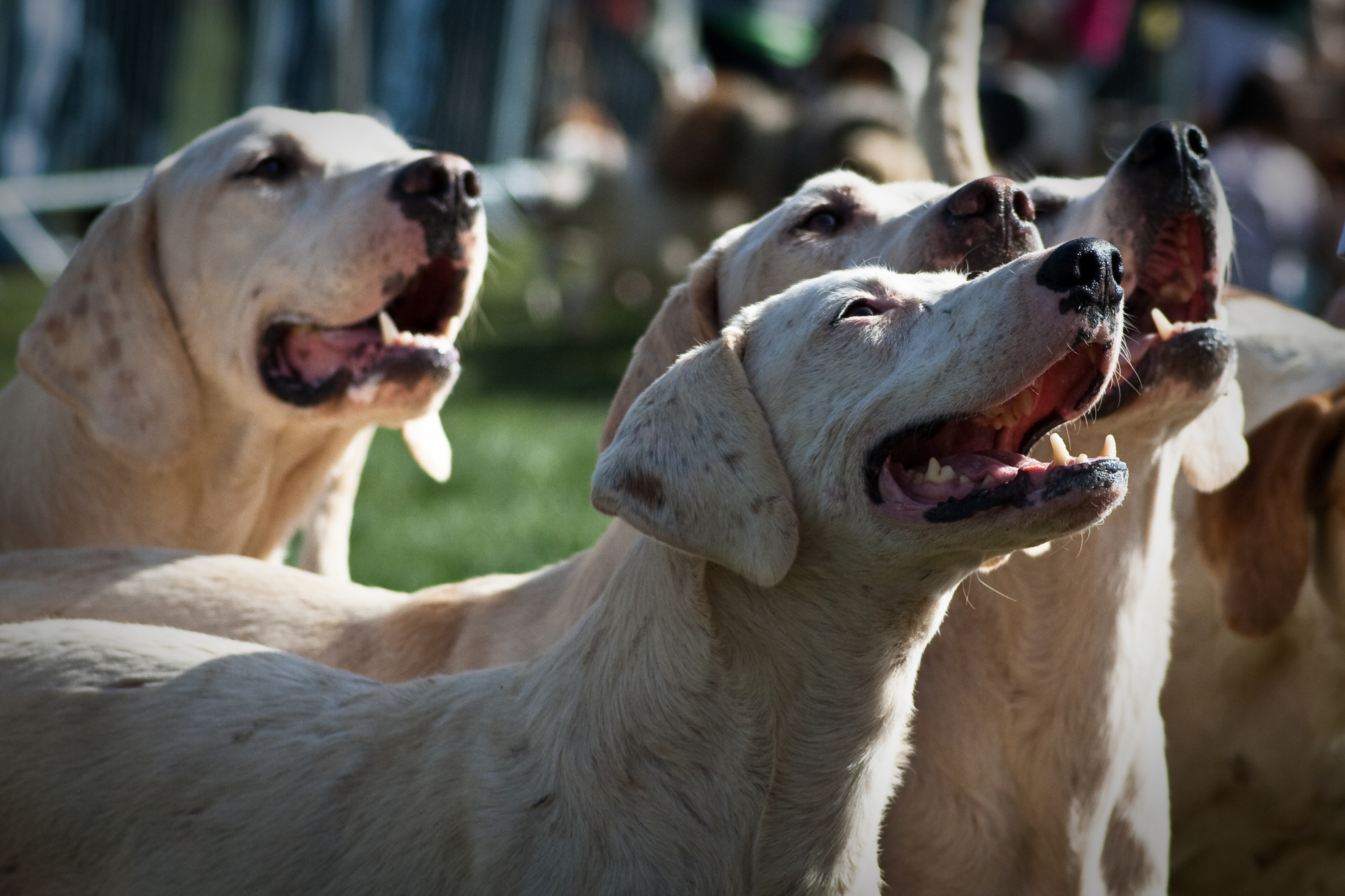 Harriers